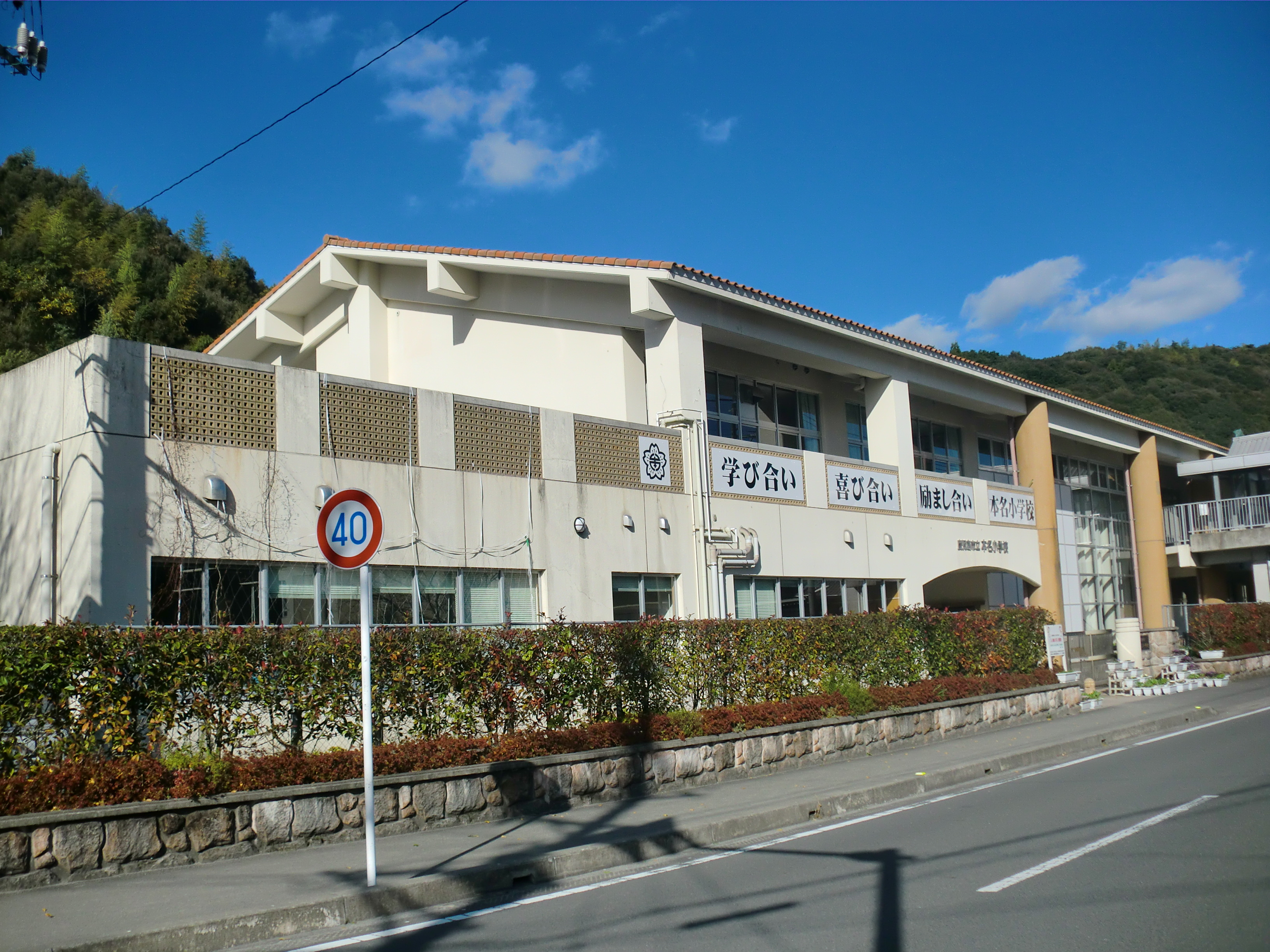 鹿児島市にある本名（ほんみょう）小学校